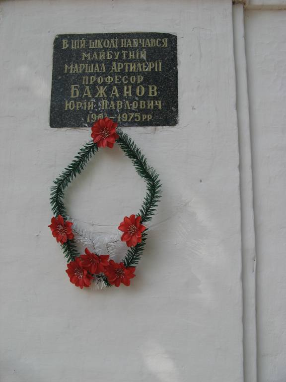 Мемориальная доска на школе г. Казатин, где учился будущий маршал артиллерии Юрий Бажанов